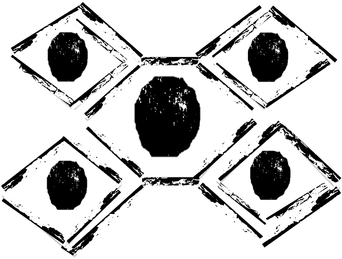 Juanjui